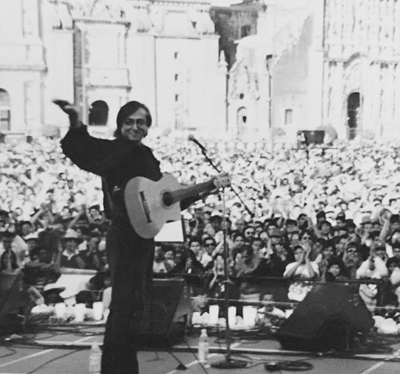 Gabino Palomares. Circa 1998. Concierto en el Zócalo de la Ciudad de México